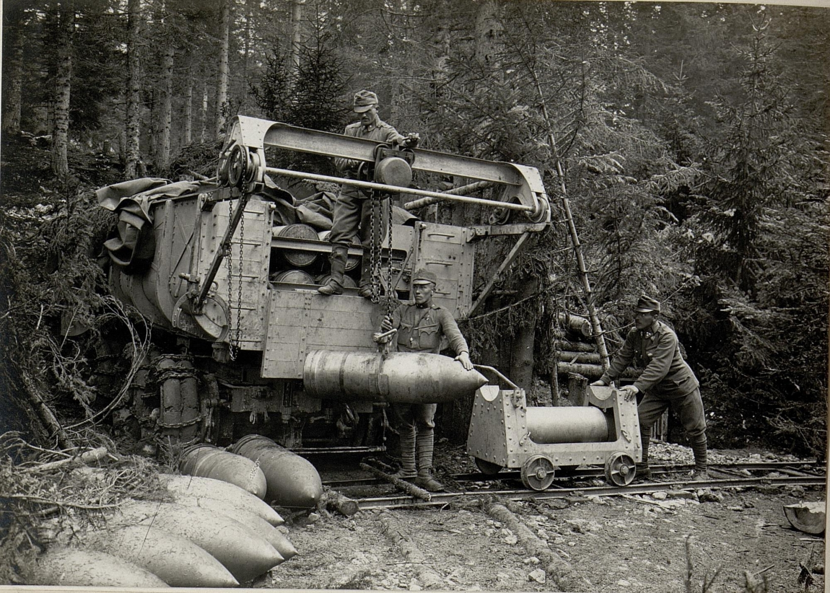 Munitionswagen 38 cm Hbh am Cost alta. Aufgenommen im Mai 1916.